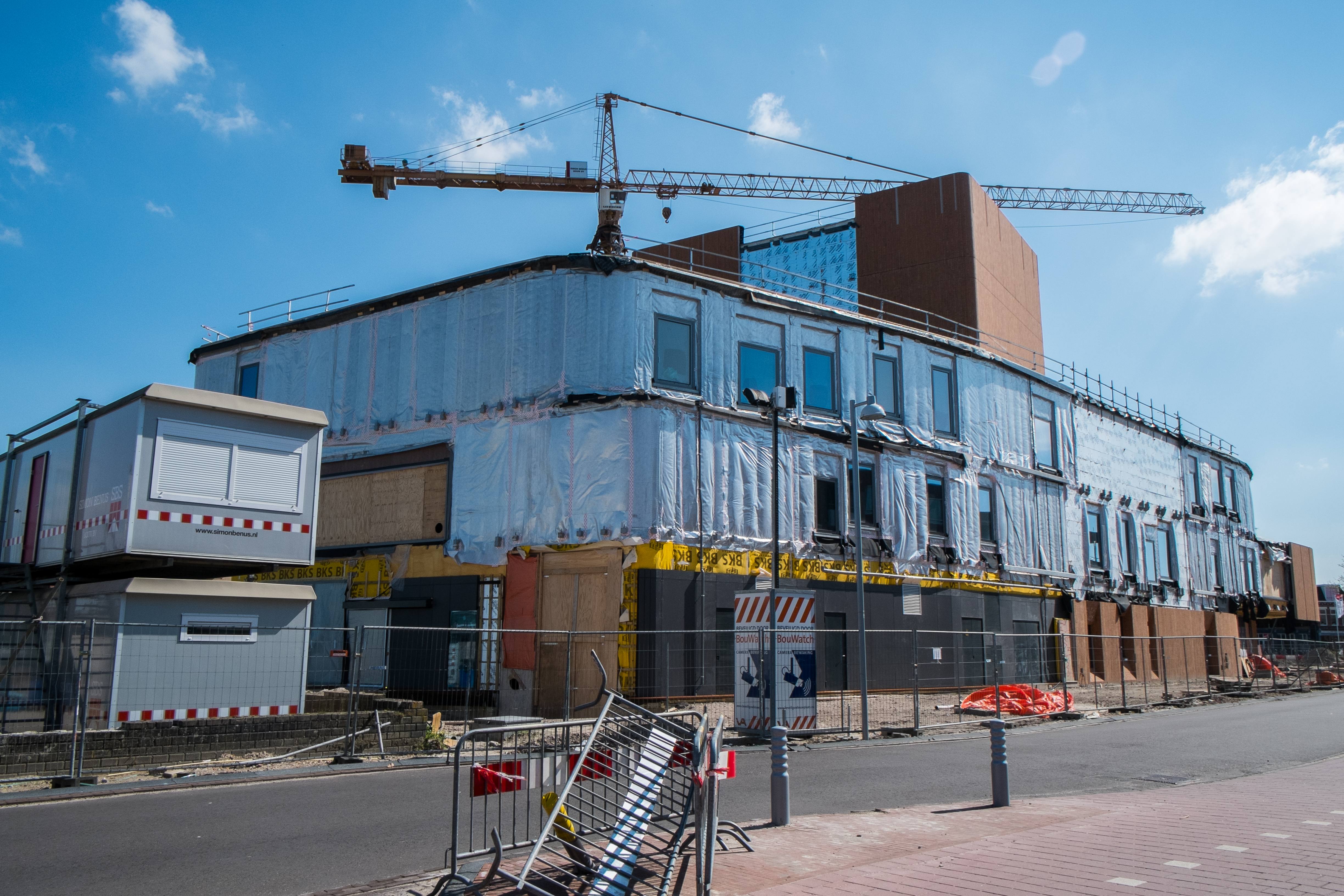 Het nieuwe cultureel centrum De Klinker in aanbouw tijdens de bouwstop in april 2014 na het faillisement van aannemer Simon Benus.